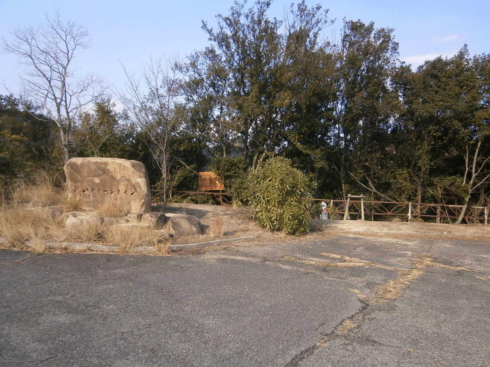 広島県福山市沼隈町にある県道、通称「福山グリーンライン」の石碑。駐車場にあるものであるが、画面中央には事件被害者の霊を祀った観音地蔵がある。